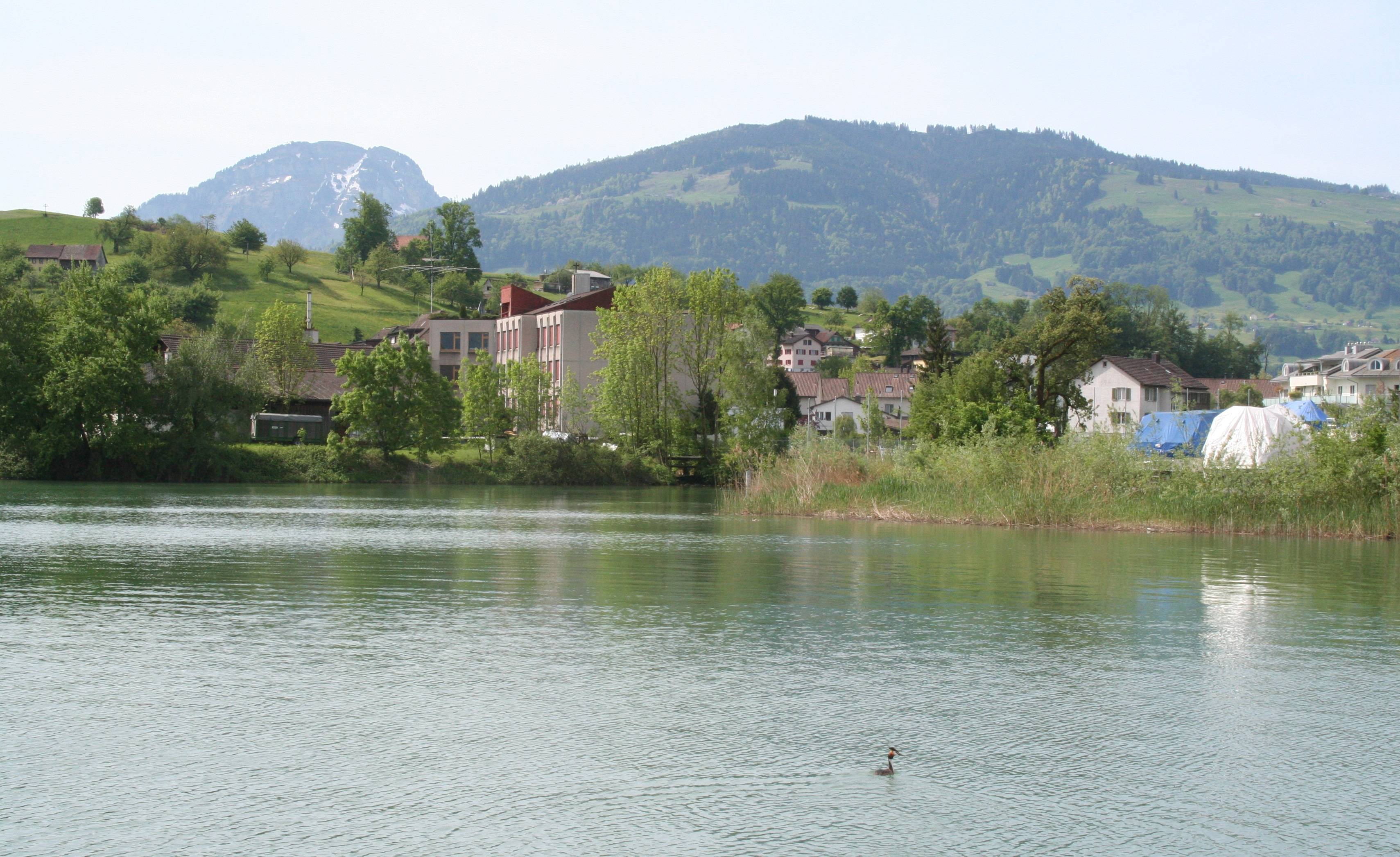 Nuolen